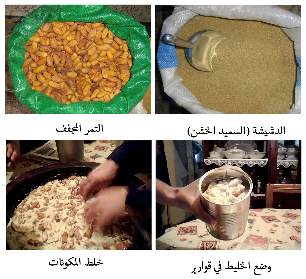 المكونات المطلوبة و كيفية تحضير بويشة